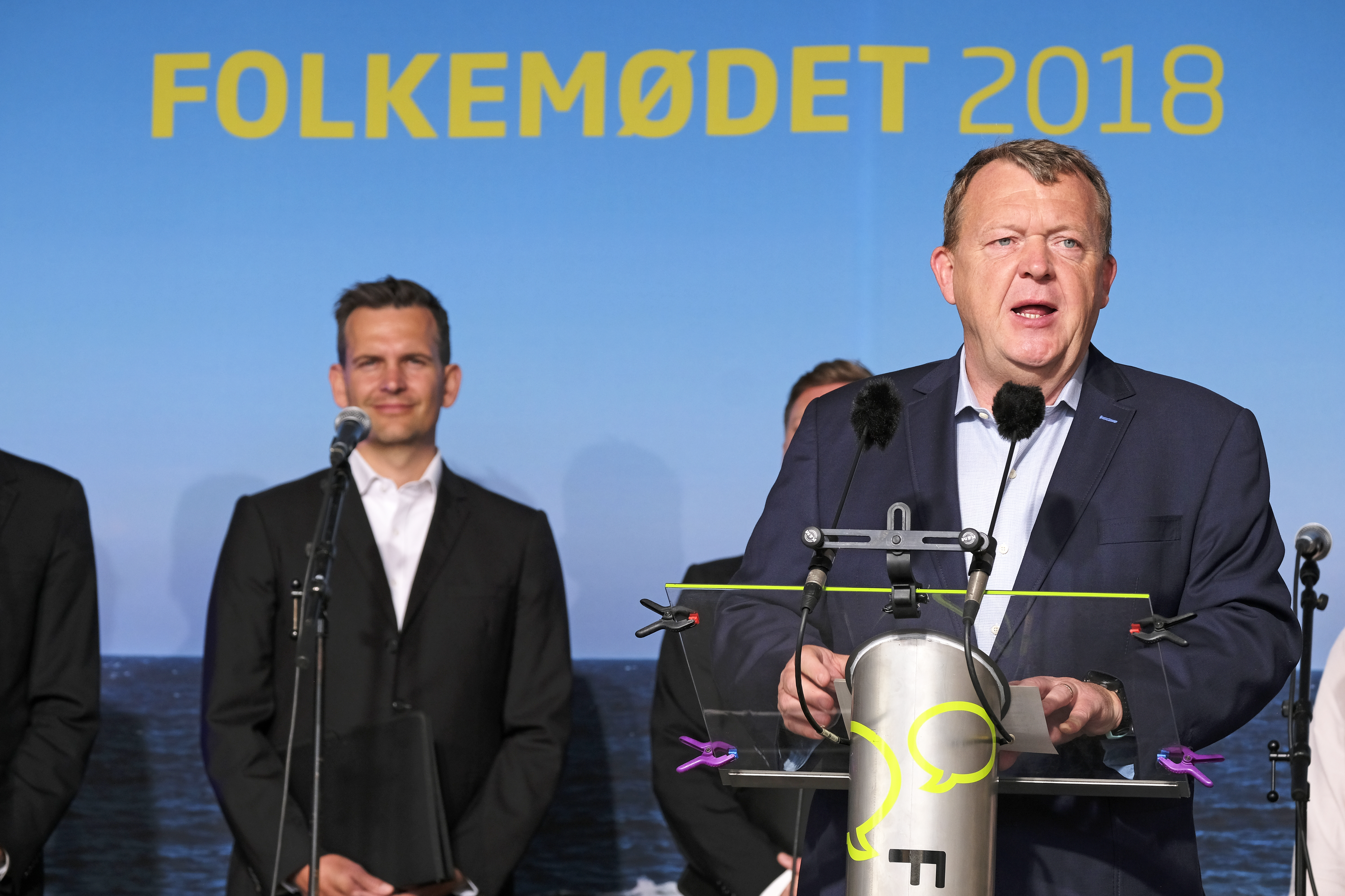 Danmarks statsminister och Venstres partiledare Lars Løkke Rasmussen invigningstalar vid Folkemødet i Allinge på Bornholm, torsdag 14 juni.. Photo: News Øresund - Johan Wessman. © News Øresund - Johan Wessman. (CC BY 3.0). Detta verk av News Øresund är licensierat under en Creative Commons Erkännande 3.0 Unported-licens (CC BY 3.0). Bilden får fritt publiceras under förutsättning att källa anges. .The picture can be used freely under the prerequisite that the source is given. News Øresund, Malmö, Sweden.News Øresund är en oberoende regional nyhetsbyrå som är en del av det oberoende dansk-svenska kunskapscentrat Øresundsinstituttet. .